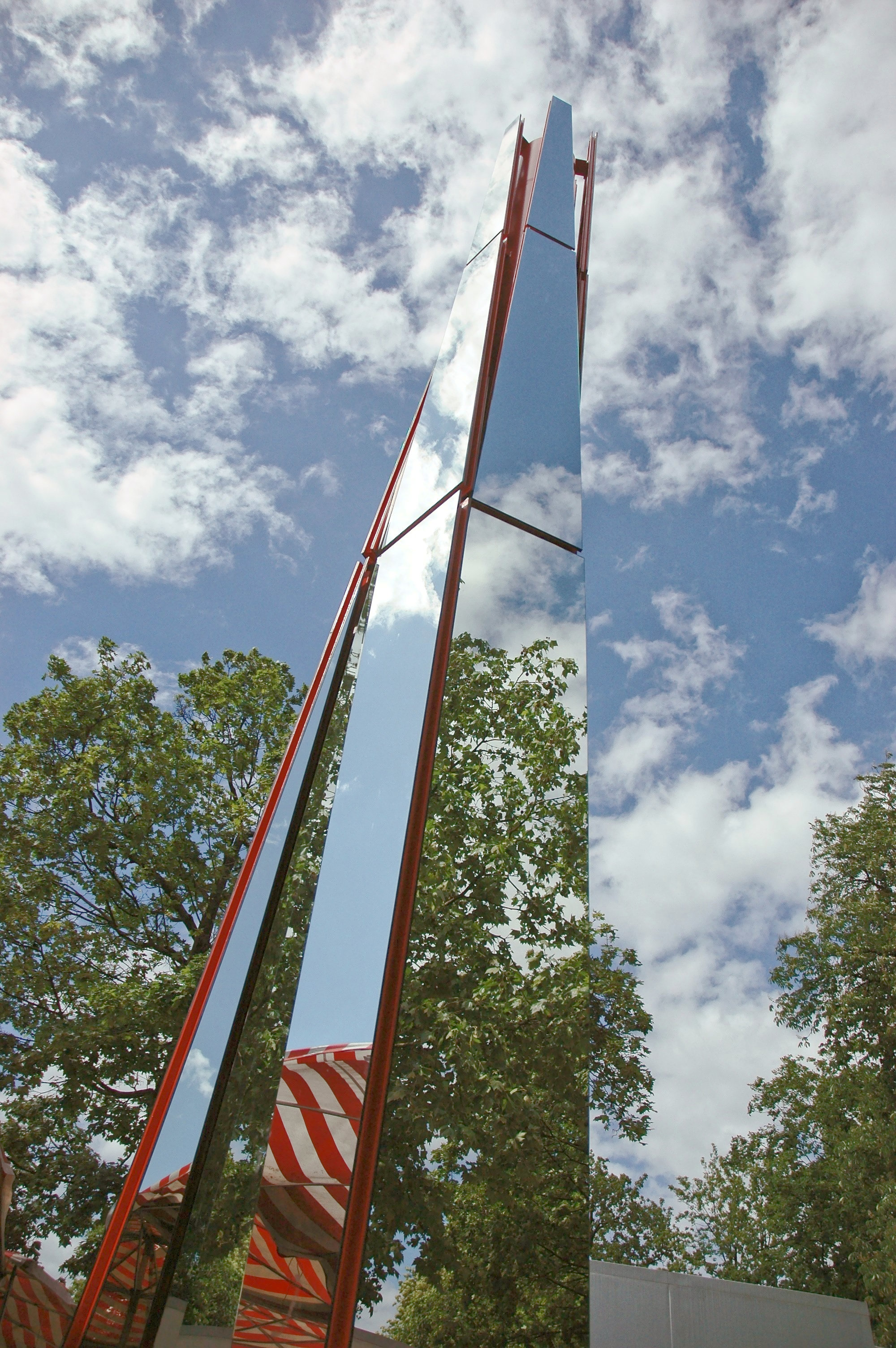 Spiegelsäule auf der Fürther Freiheit / Mirror-Column on the Fürther Freiheit